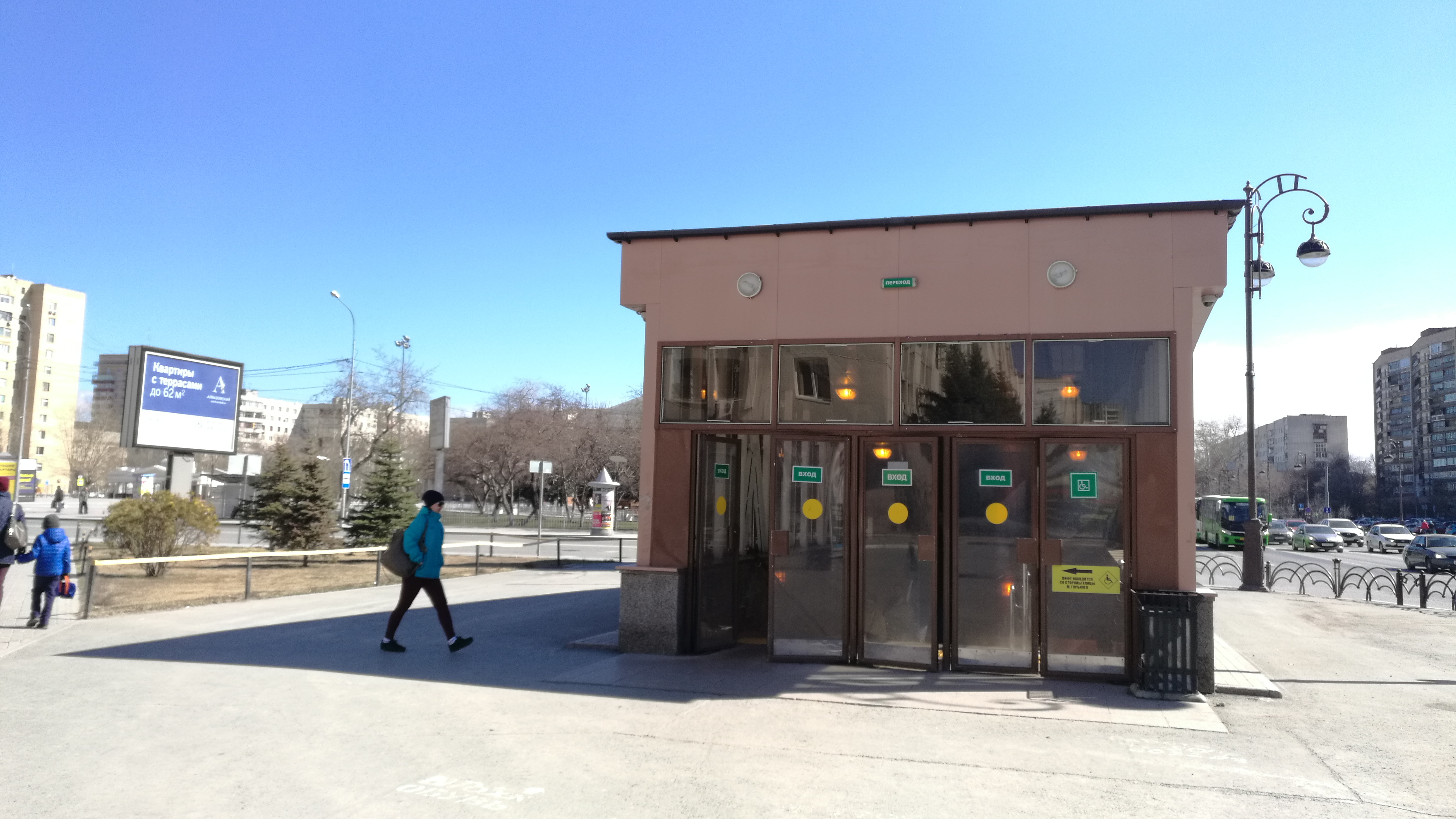 Subtera pasejo ĉe kruciĝo de stratoj Respubliko kaj Maksim Gorkij. Tjumeno, Rusio.